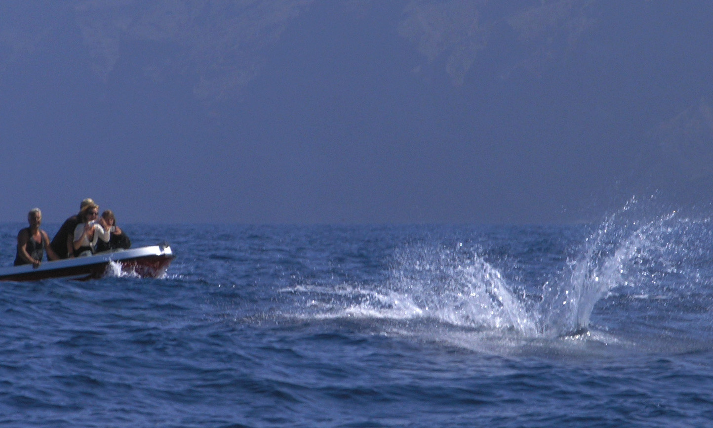 Nach dem Sprung des großen Tümmlers (Tursiops truncatus) entsteht durch die Wucht des Aufpralls ein weithin sichtbarer "Splash"